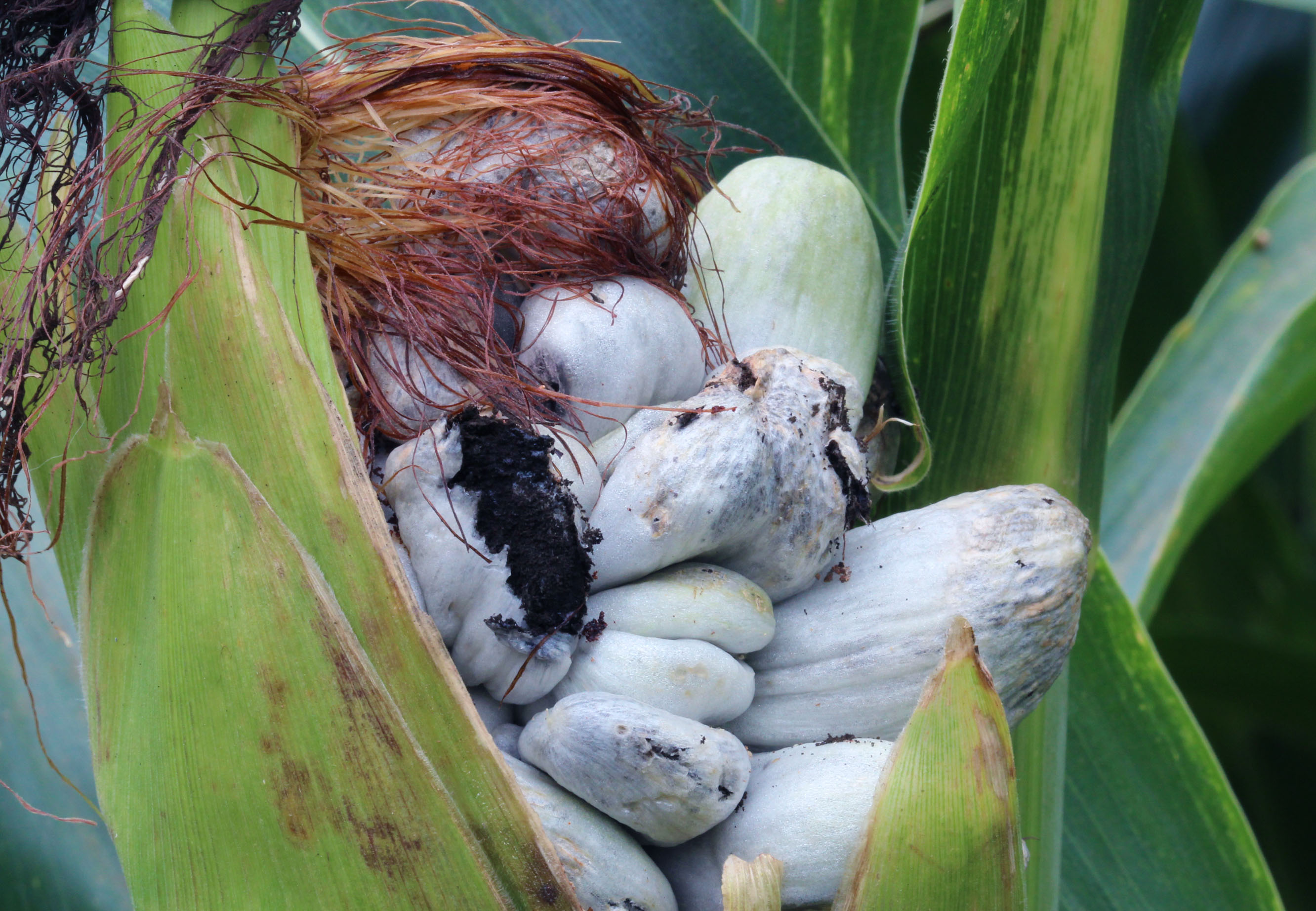 Ustilago maydis (DC.) Corda